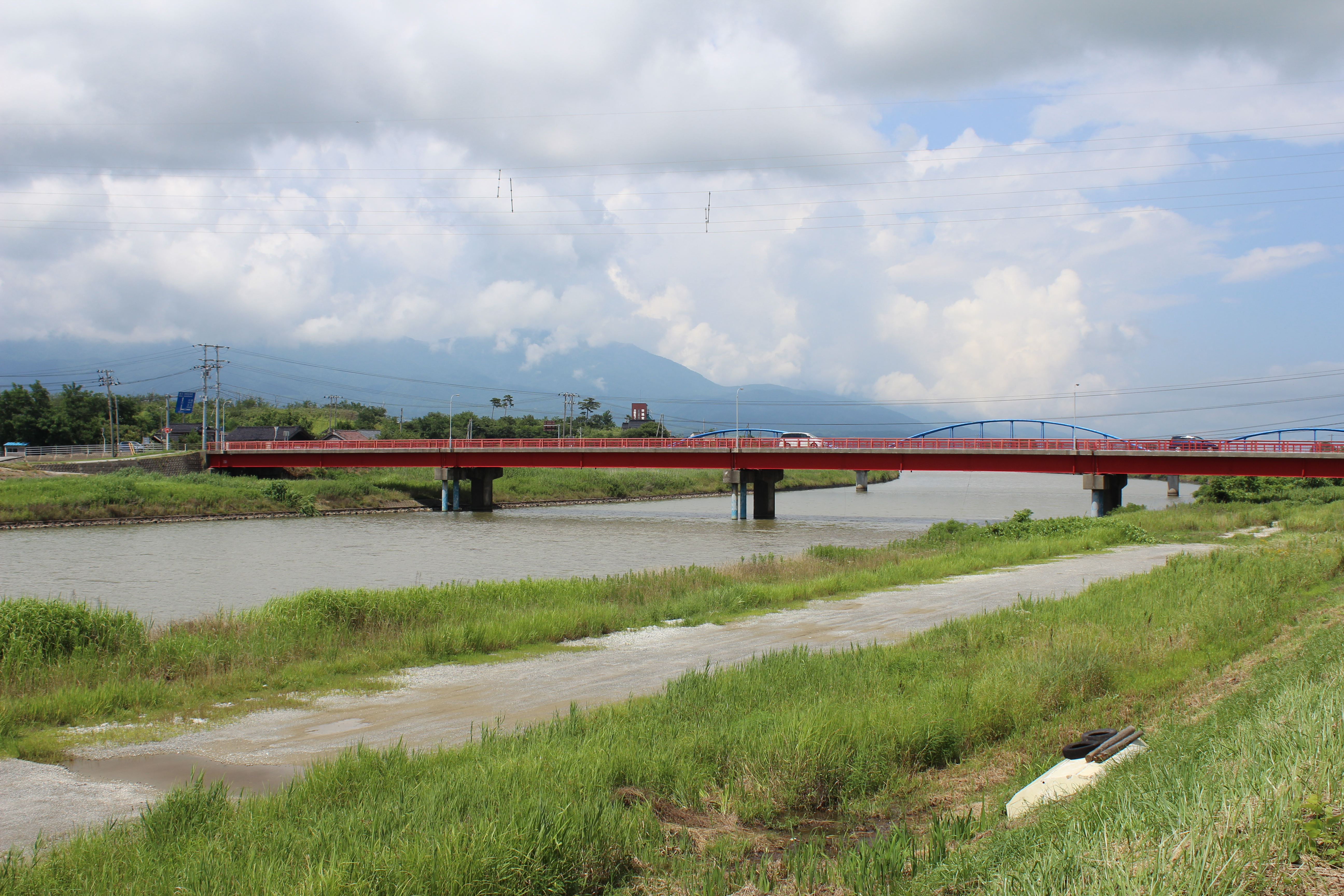 国府川。河口付近より上流方向（国道350号国府橋）を撮影。